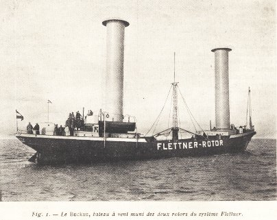 Le Buckau, bateau à vent muni de deux rotors du système Flettner